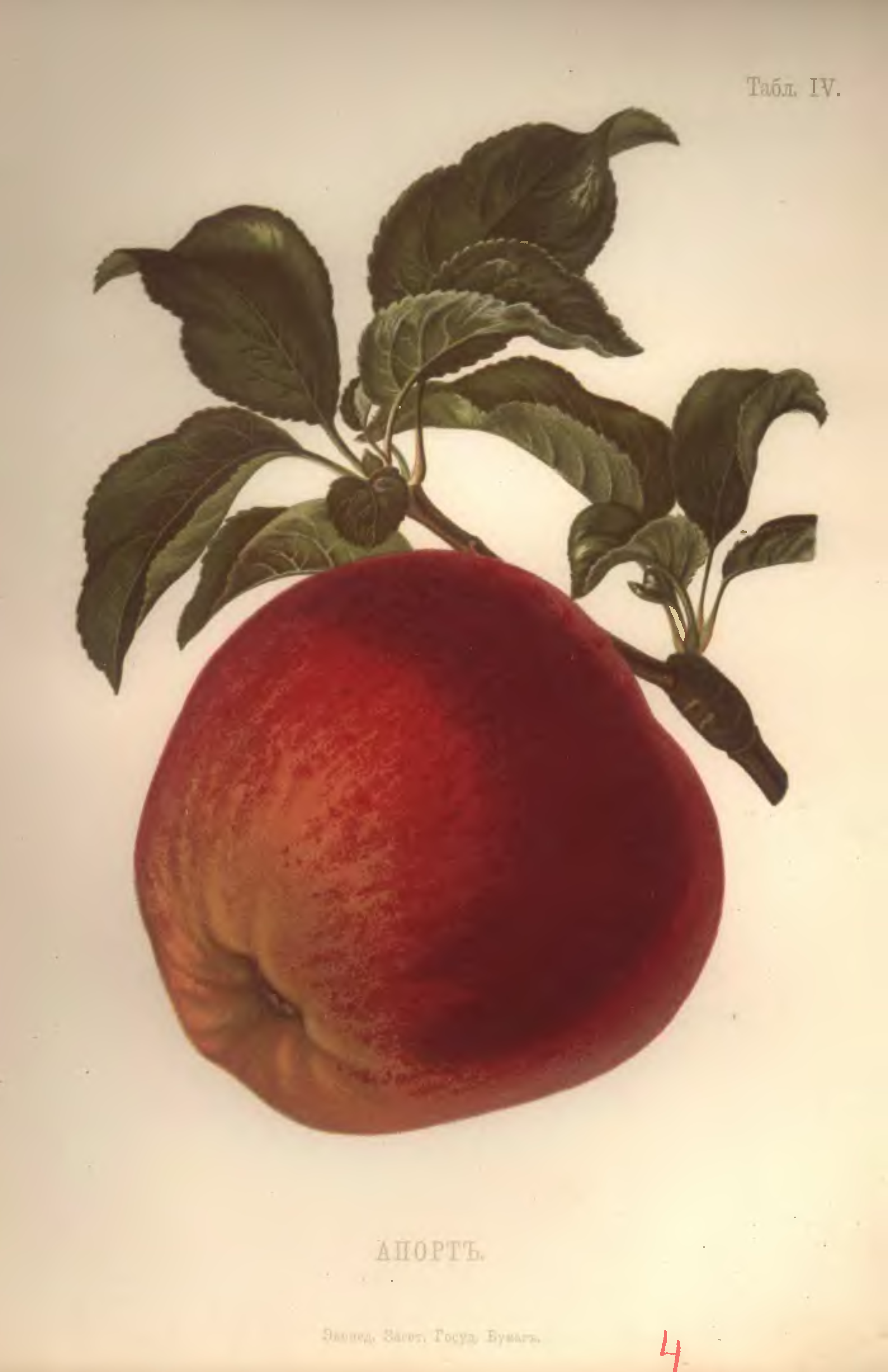 Апорт